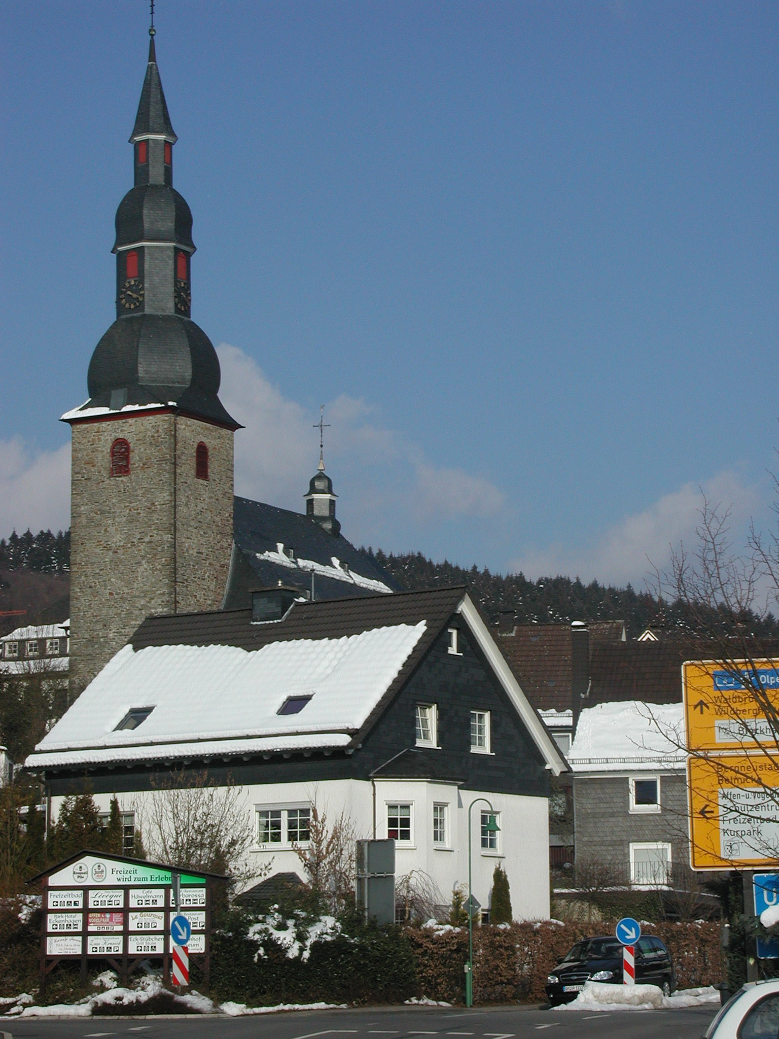 Eckenhagen Kirchenansicht